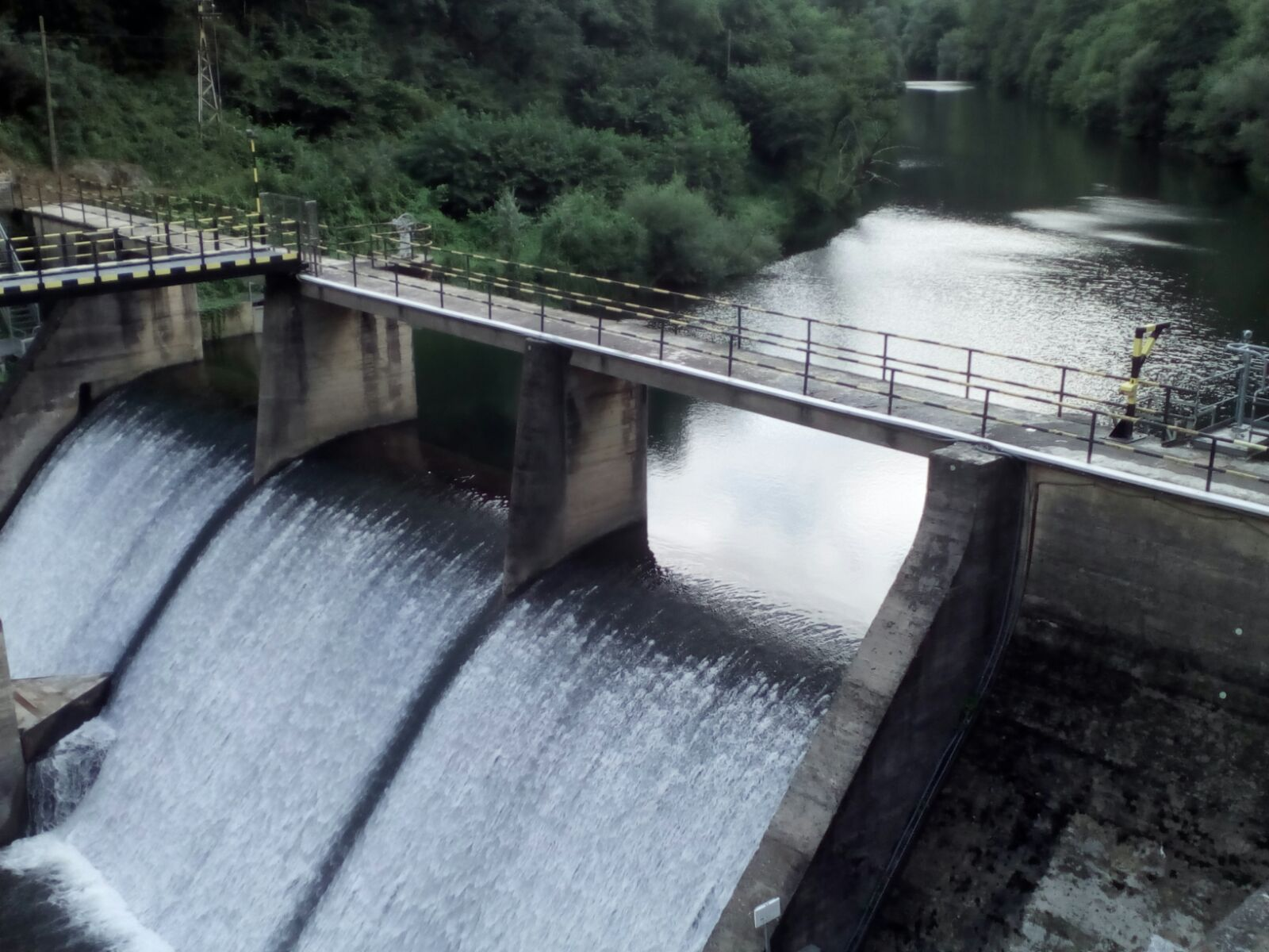 Presa del embalse de Los Corrales de Buelna, en Cantabria (España), que represa las aguas del río Besaya.